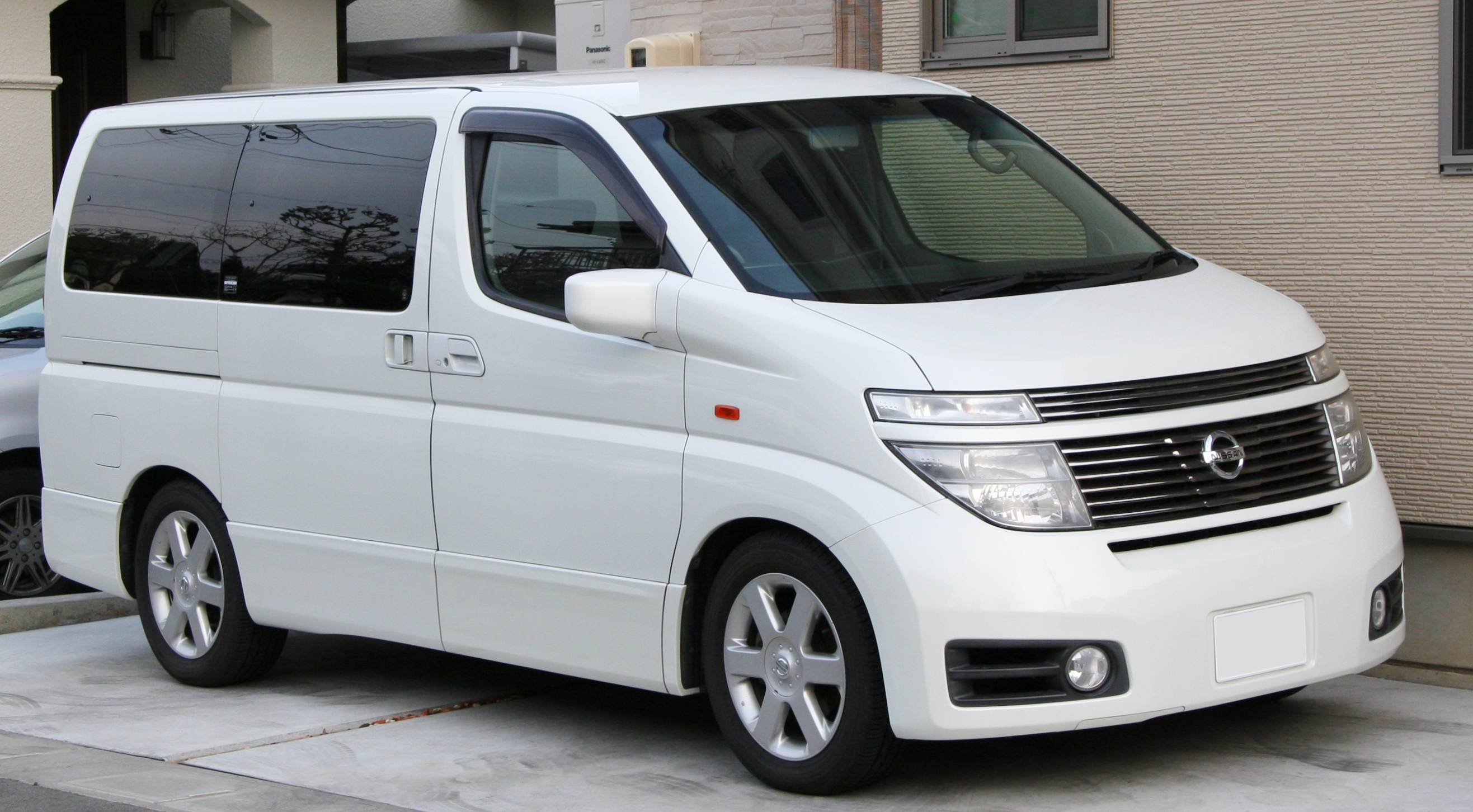 NISSAN ELGRAND Highway STAR